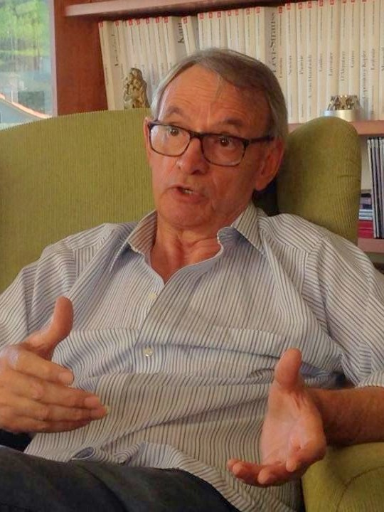 Antón Costas (Vigo, 1949), naceu en Matamá, pero ao tempo que esa parroquia se convertía nunha das de maior PIB de Galicia coa instalación da fábrica de Citroën, el emigraba nos anos 70 a Barcelona, onde da man de Fabià Estapé entrou de profesor na súa universidade, na que é catedrático de Economía Aplicada. Costas presidiu o Círculo de Economía de Barcelona, tivo cargos de responsabilidade en Endesa e é accionista e membro de consellos de administración de varias empresas. Defínese a si mesmo como economista neoclásico, “defensor do mercado” pero crítico coa deriva do capitalismo e o incremento da desigualdade, posturas que vén expoñendo nos seus numerosos libros, nos que a historia económica ten unha importante presenza. Cada verán volve pola súa casa de Matamá, no rururbán vigués, onde fala devagar con Praza Pública.